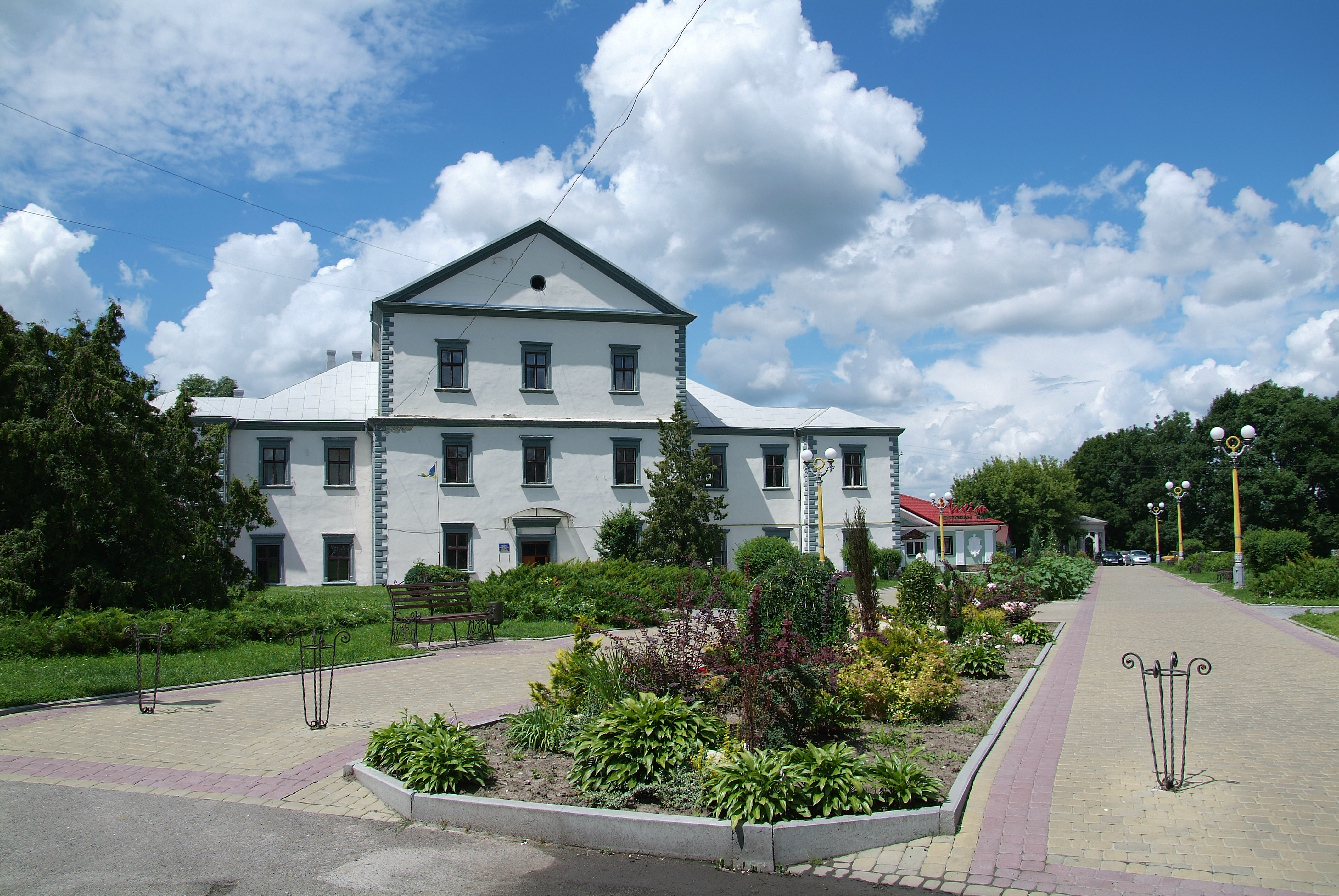 Старий замок, Тернопіль, вул. Замкова, 12